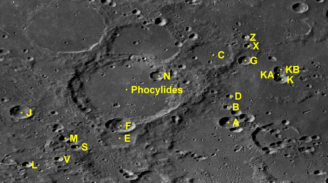 Cráter lunar Phocylides. Cráteres satélite. (Imagen LRO)